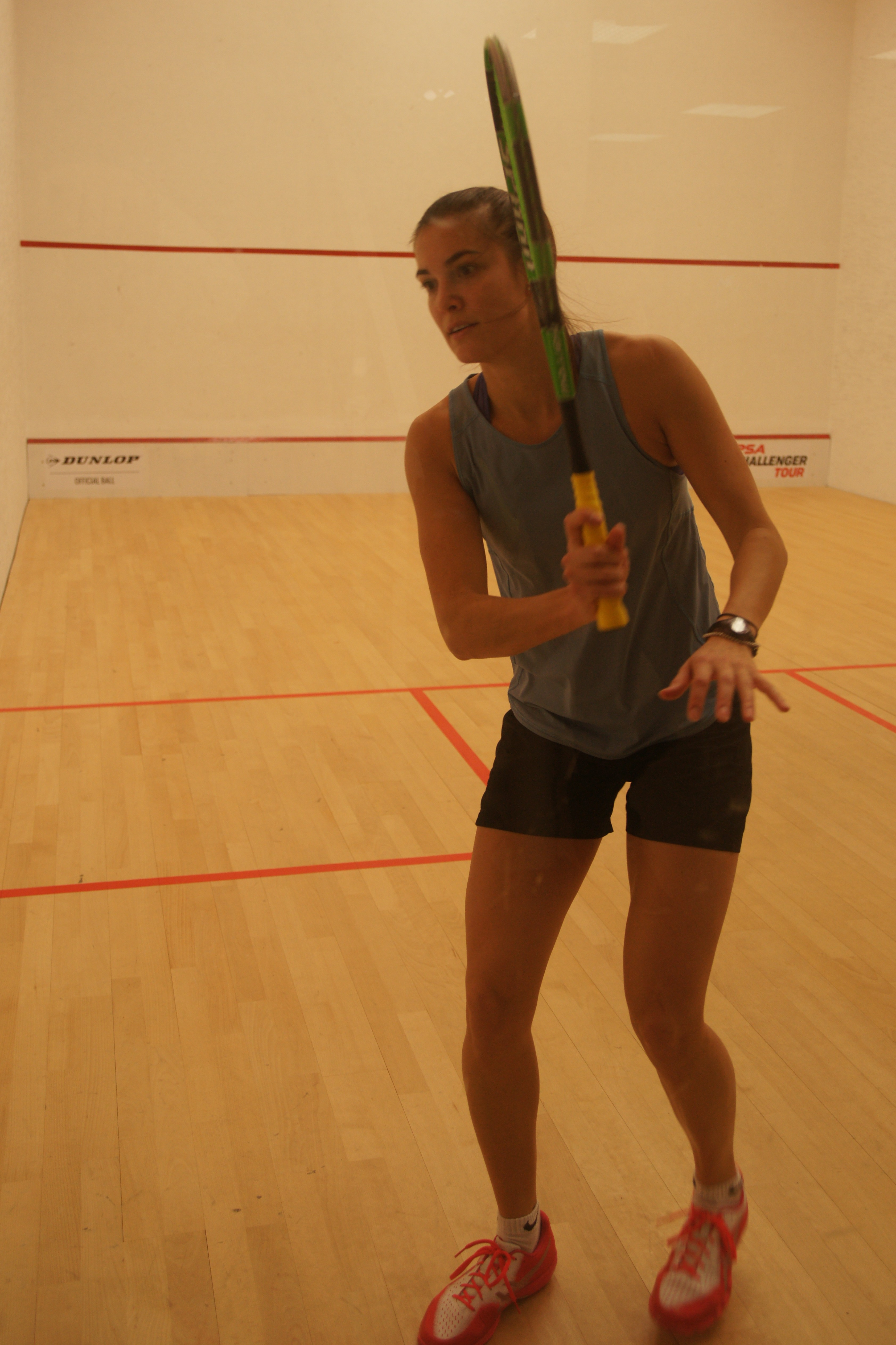 samantha cornett, Monaco Squash classic 2018